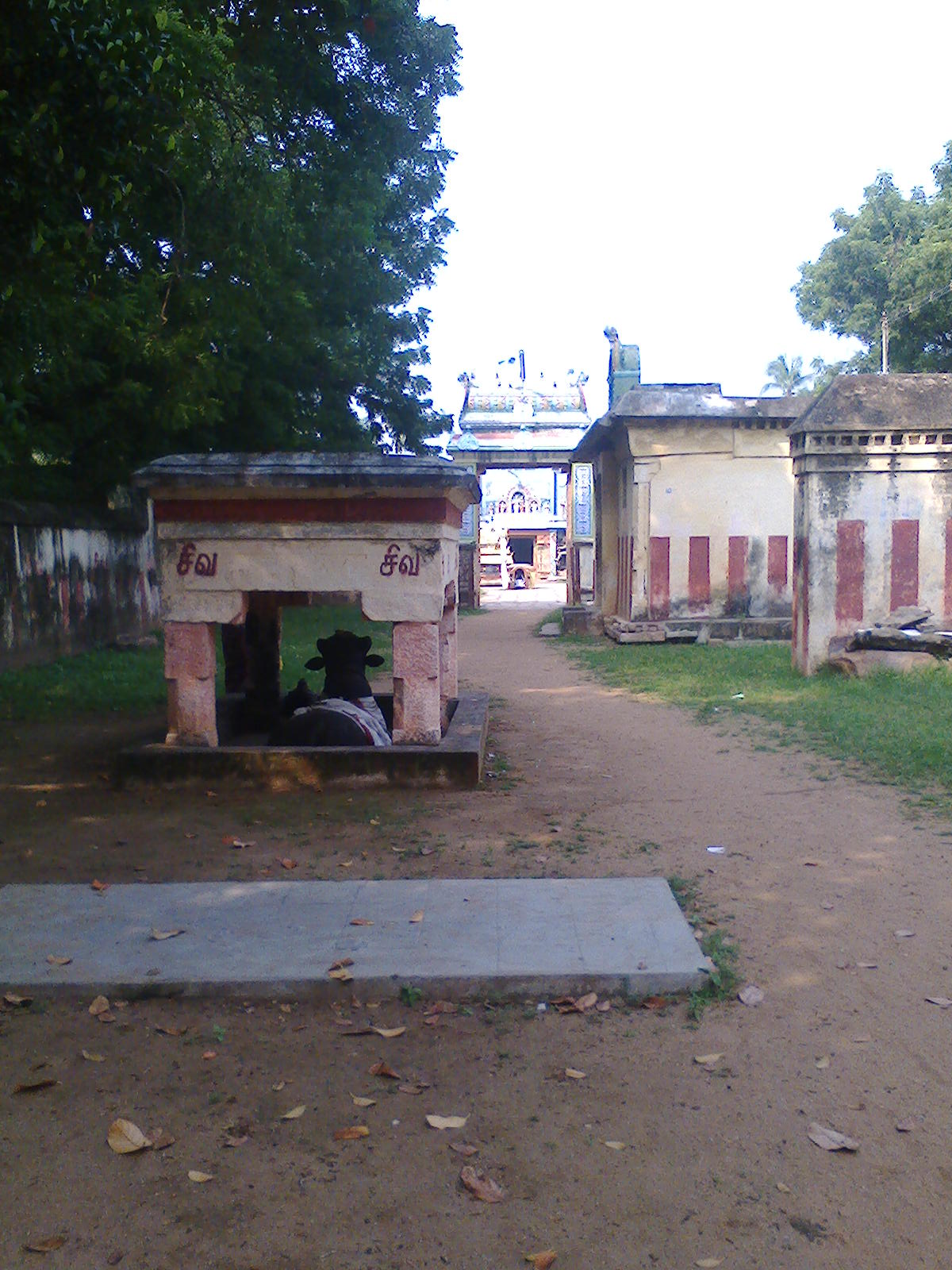 திருப்பூந்துருத்தி புஷ்பவனேஸ்வரர் கோயில் நந்தி விலகியது